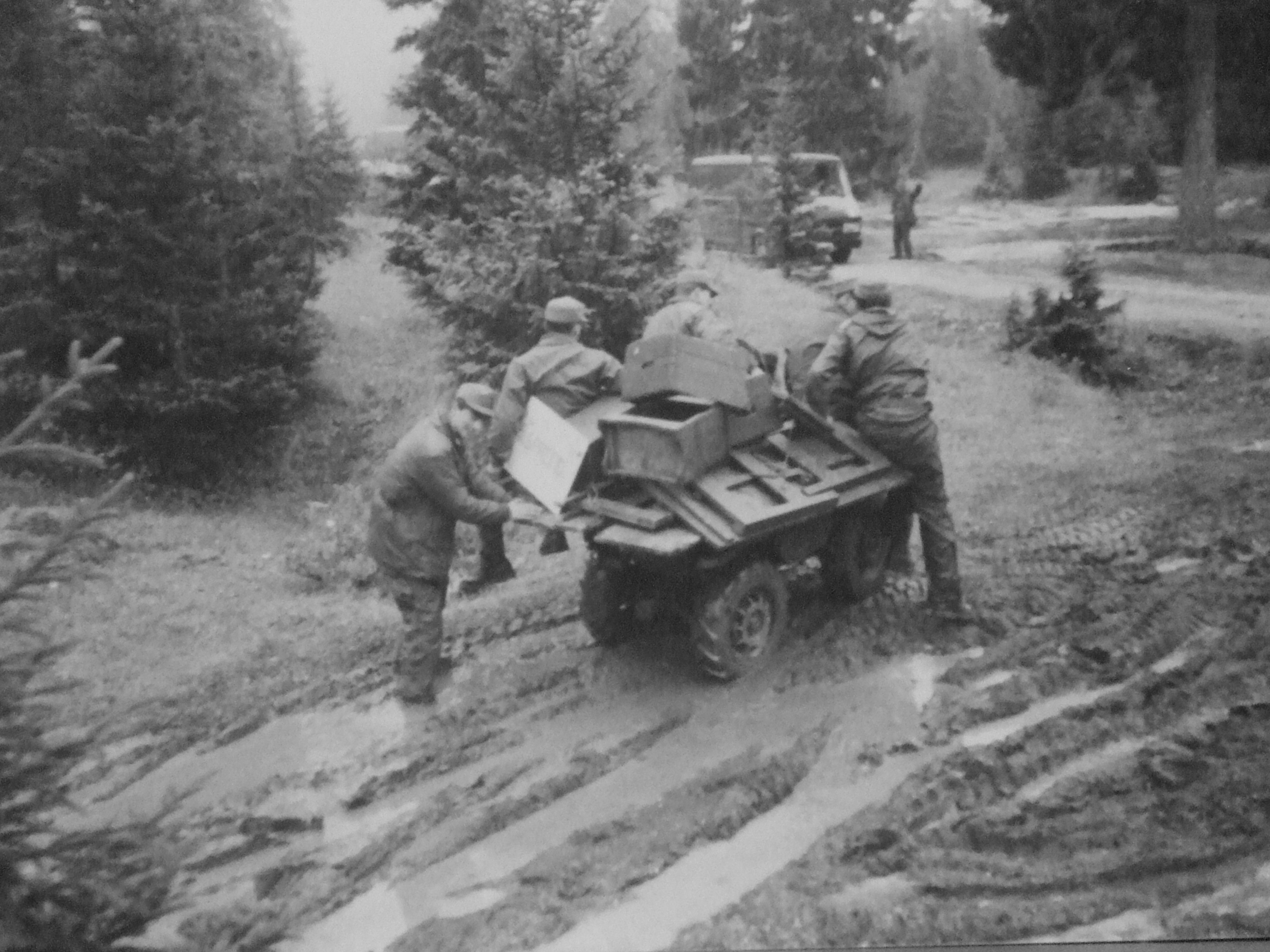 Motocarrello, o mulo meccanico, Fresia F10 (nomenclatura militare: MTC80), in prova d'uso all'Esercito Italiano (corpo degli Alpini) in 36 esemplari, negli anni '80 - ruote non sterzanti, guida con leve tipo cingolato; sostituito dagli anni novanta con il motocarrello Fresia F18 (nomenclatura militare: MTC90)